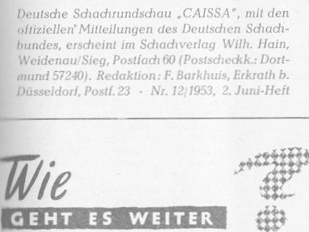 Schachzeitschrift CAISSA, Impressum des 2. Juniheftes 1953.